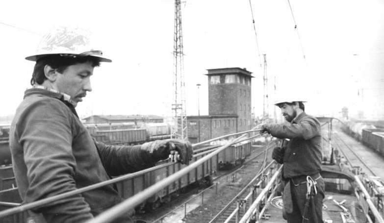 Berlin, tschechische Gastarbeiter ADN-ZB Bartocha 18.4.88-A- Bez. Neubrandenburg: Steckenelektrifizierung- Auf dem Bahnhof Paselwalk montieren gegenwärtig Mitarbeiter des Elektrifizierungsbetriebes EZ Prag, CSSR Fahrleistungen. Bis Ende Mai 1988 soll der Abschnitt Prenzlau Pasewalk, der zu der wichtigen Verbindung Berlin-Stralsund-Saßnitz-Mukran gehört, an das elektrische Streckennetz der Deutschen Reichsbahn angeschlossen werden.